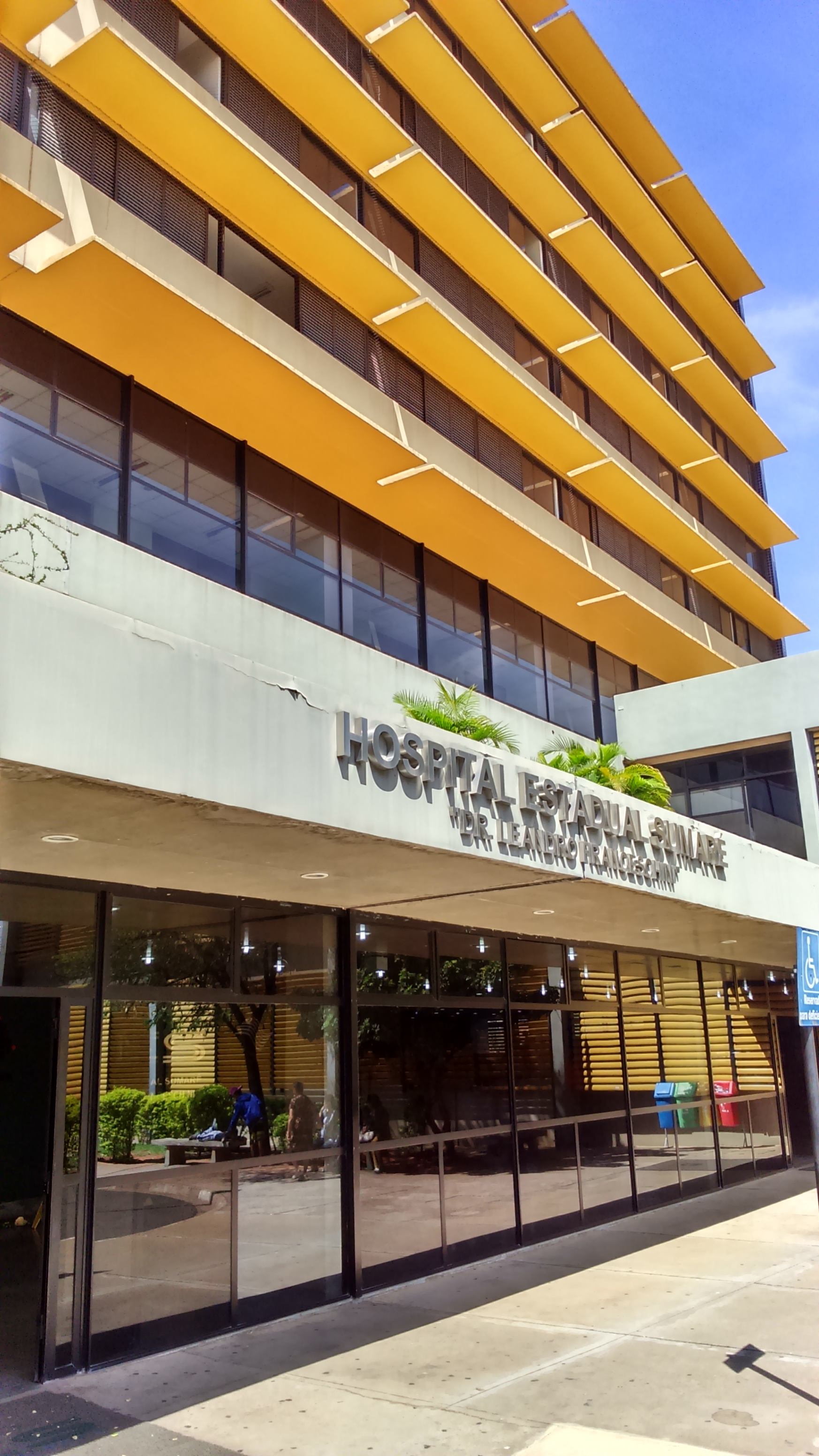 Hospital Estadual de Sumaré "Dr. Leandro Francesquini"